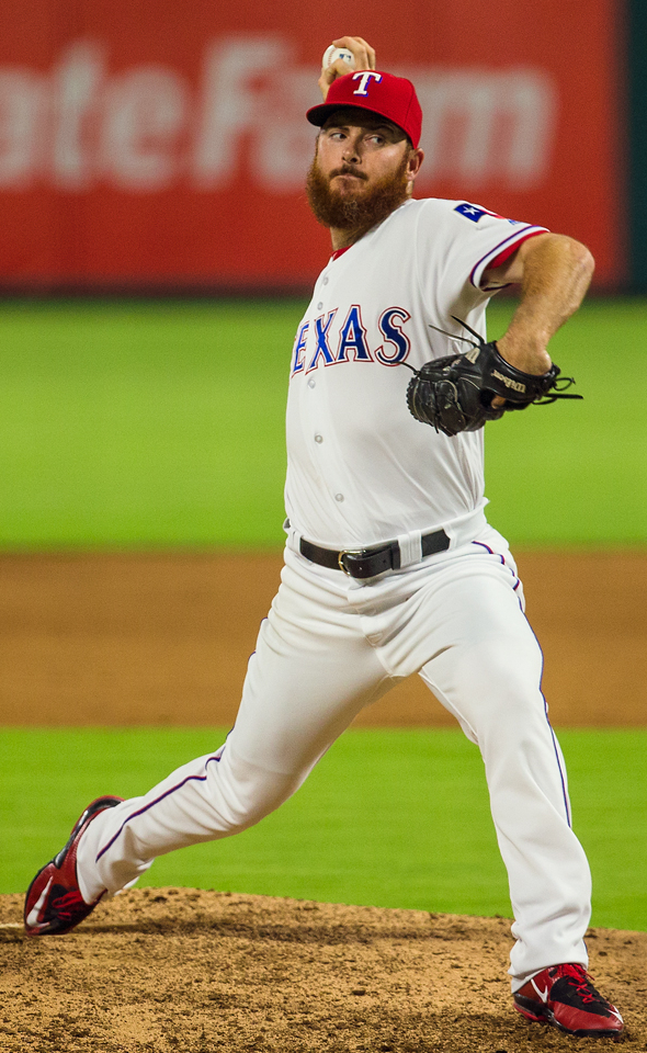 Sam Dyson